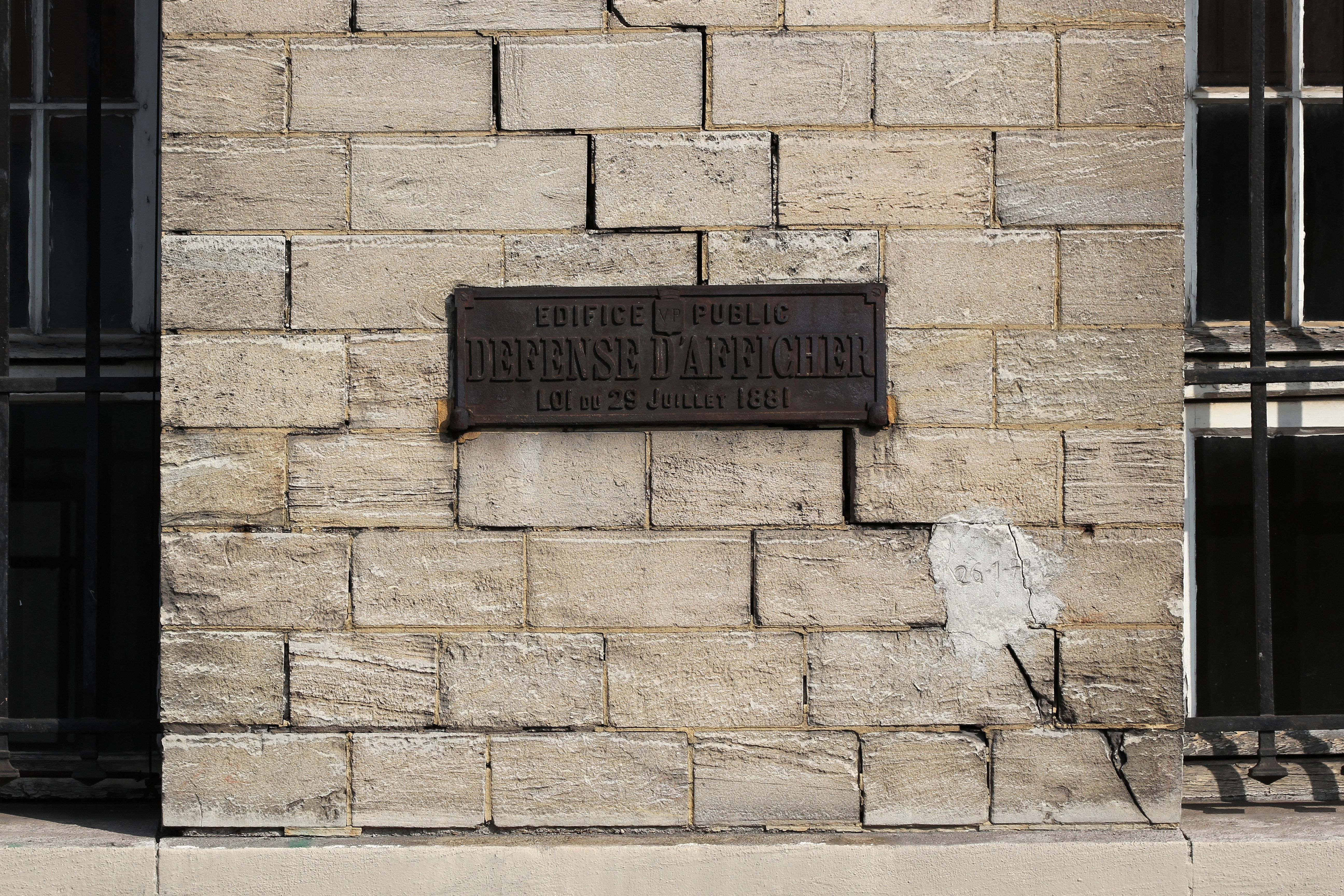 Caserne de sapeurs-pompiers Château-Landon, rue de l'Aqueduc et rue Philippe-de-Girard : défense d'afficher.